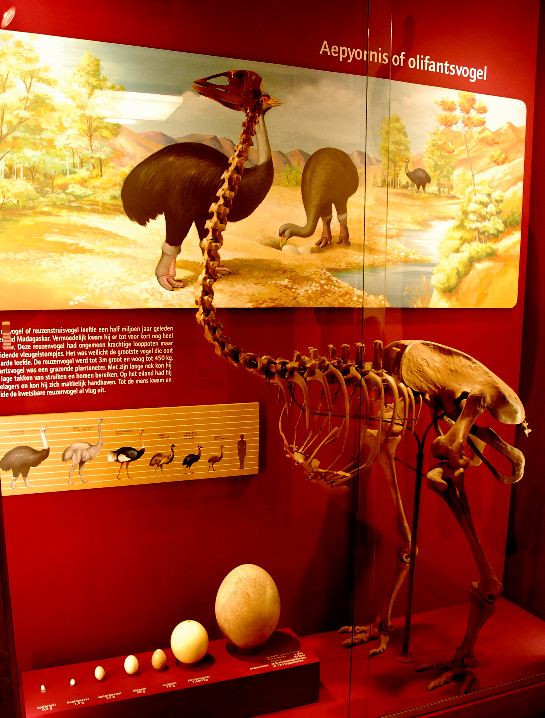 reconstructie van een olifantsvogel in het museum "de wereld van Kina" in gent, België